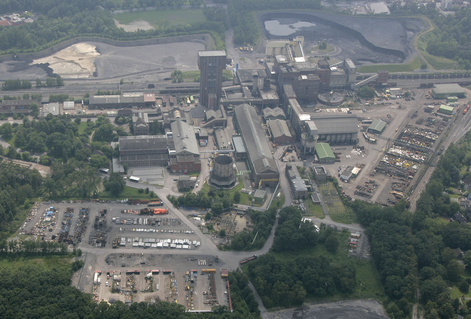 Luftbildaufnahme Hamm